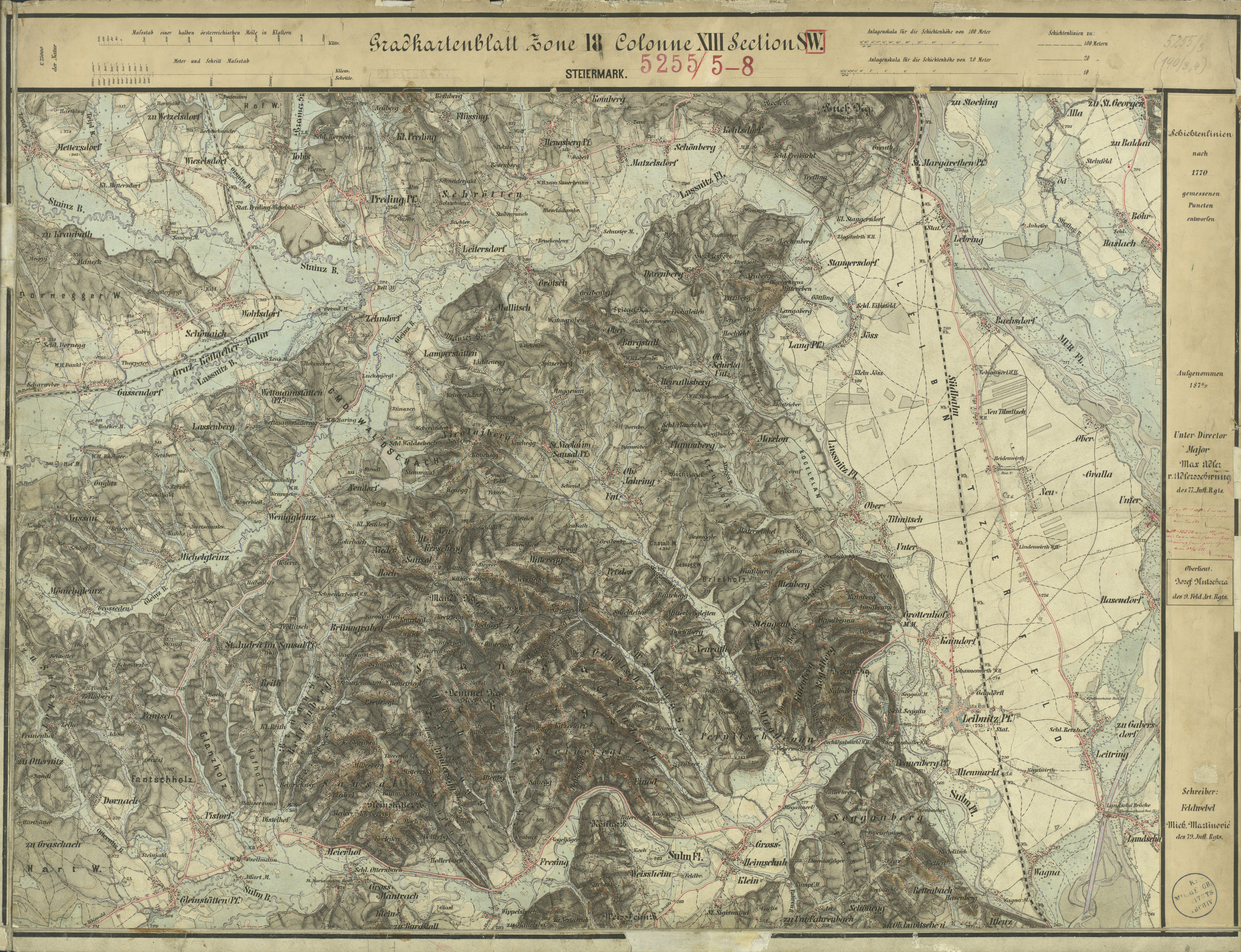 historische Landkarte: Gradkartenblatt Zone 18 Colonne XIII Section SW (später 5255/3). Franzisco-josephinische (3.) Landesaufnahme der österreichisch-ungarischen Monarchie. Aufnahmeblatt 1:25.000. Aufgenommen 1879, Sausal, Leibnitz